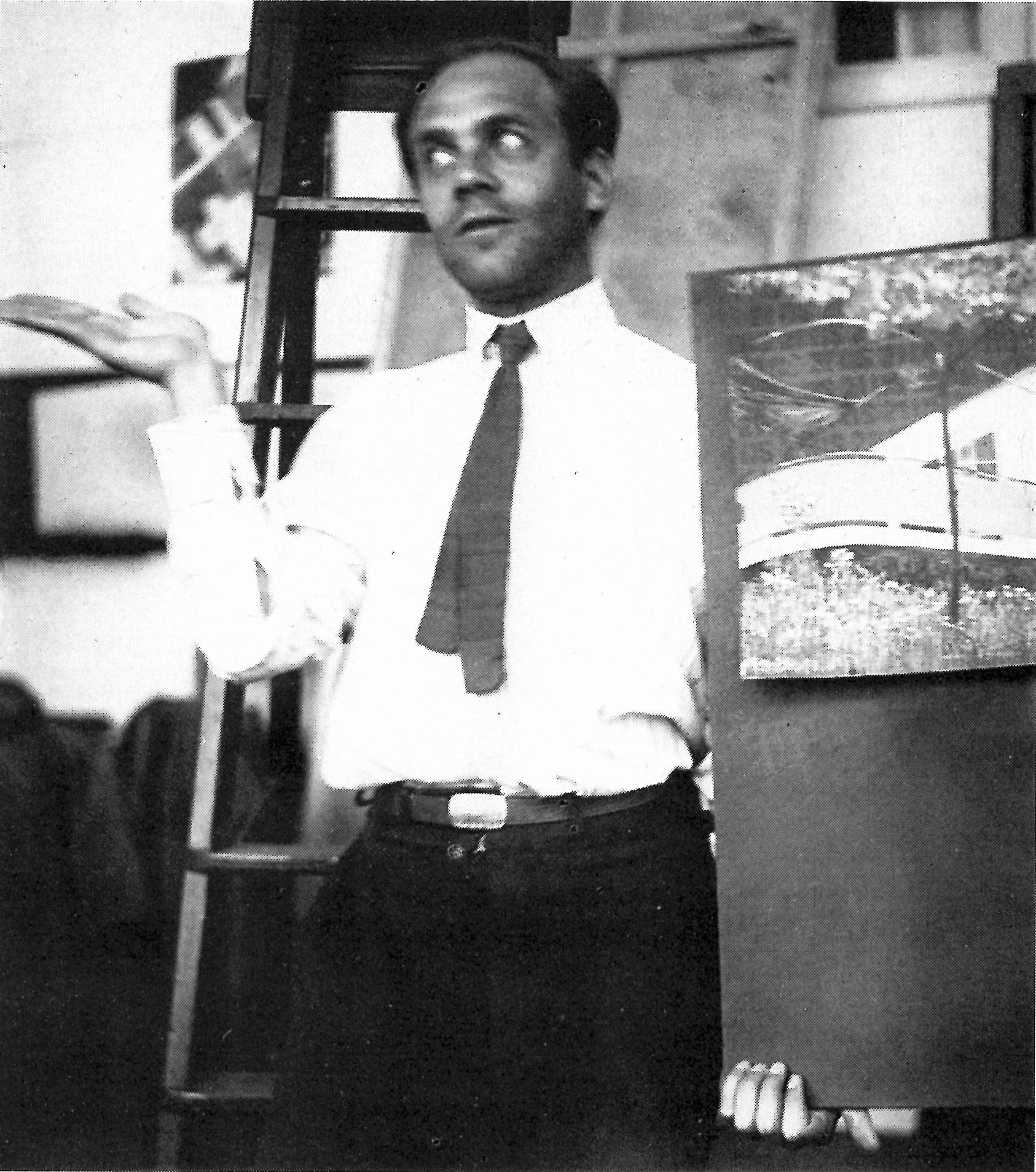 Die einzige erhaltene Fotografie Michail Ochitowitschs. Ende 1920er bis Anfang 1930er-Jahre